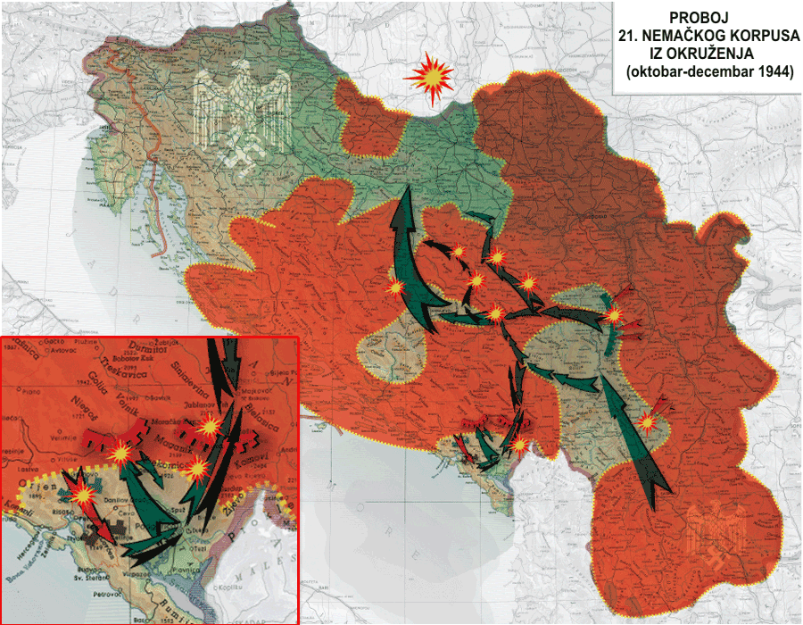 Srpskohrvatski / српскохрватски: Proboj Nemaca iz Srbije i Crne Gore preko Sandžaka ka Bosni, u sklopu proboja Armije E iz Grčke. Četnici su nastupali zajedno sa Nemcima.